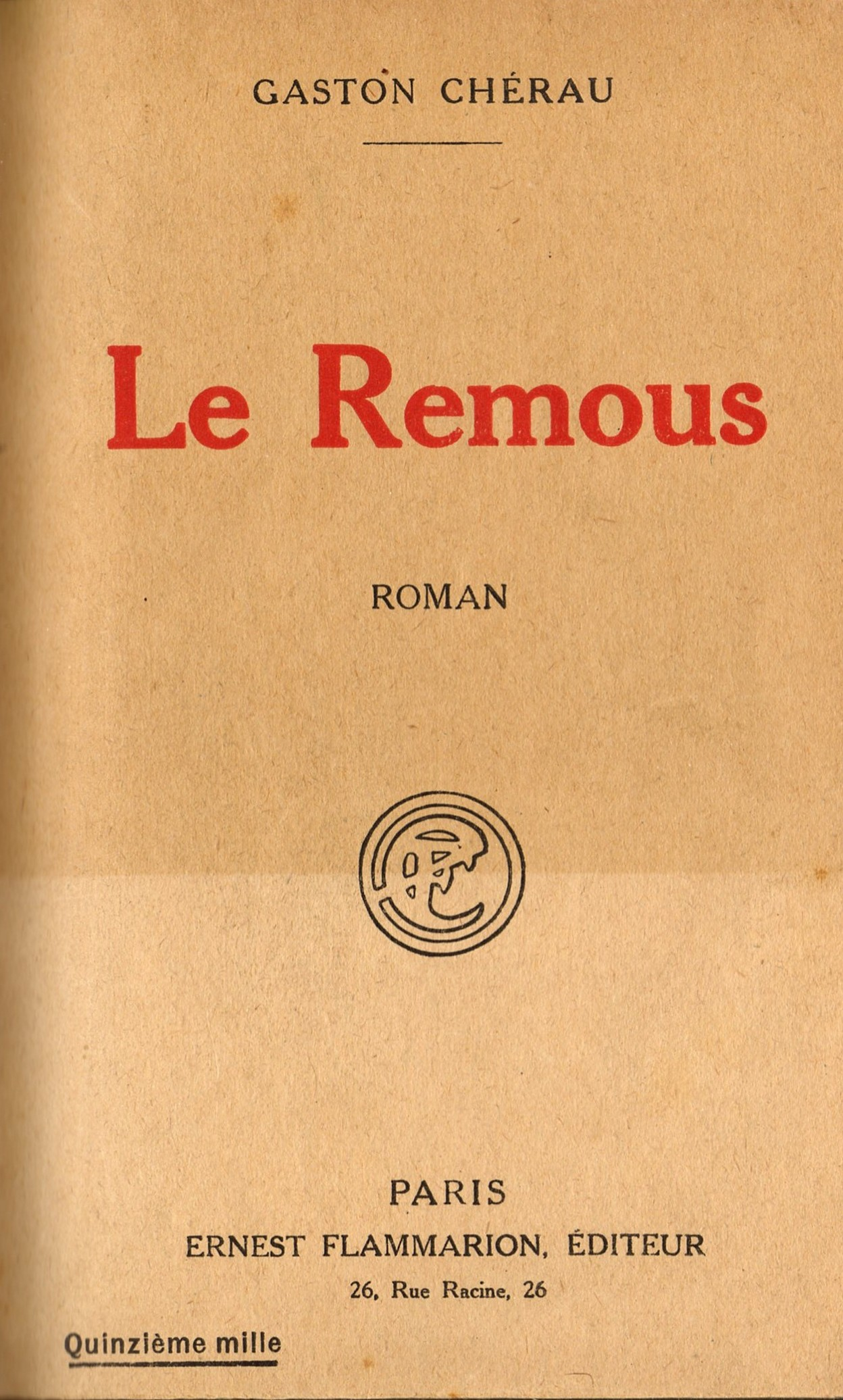 Couverture du roman "Le remous" (édition 1922)